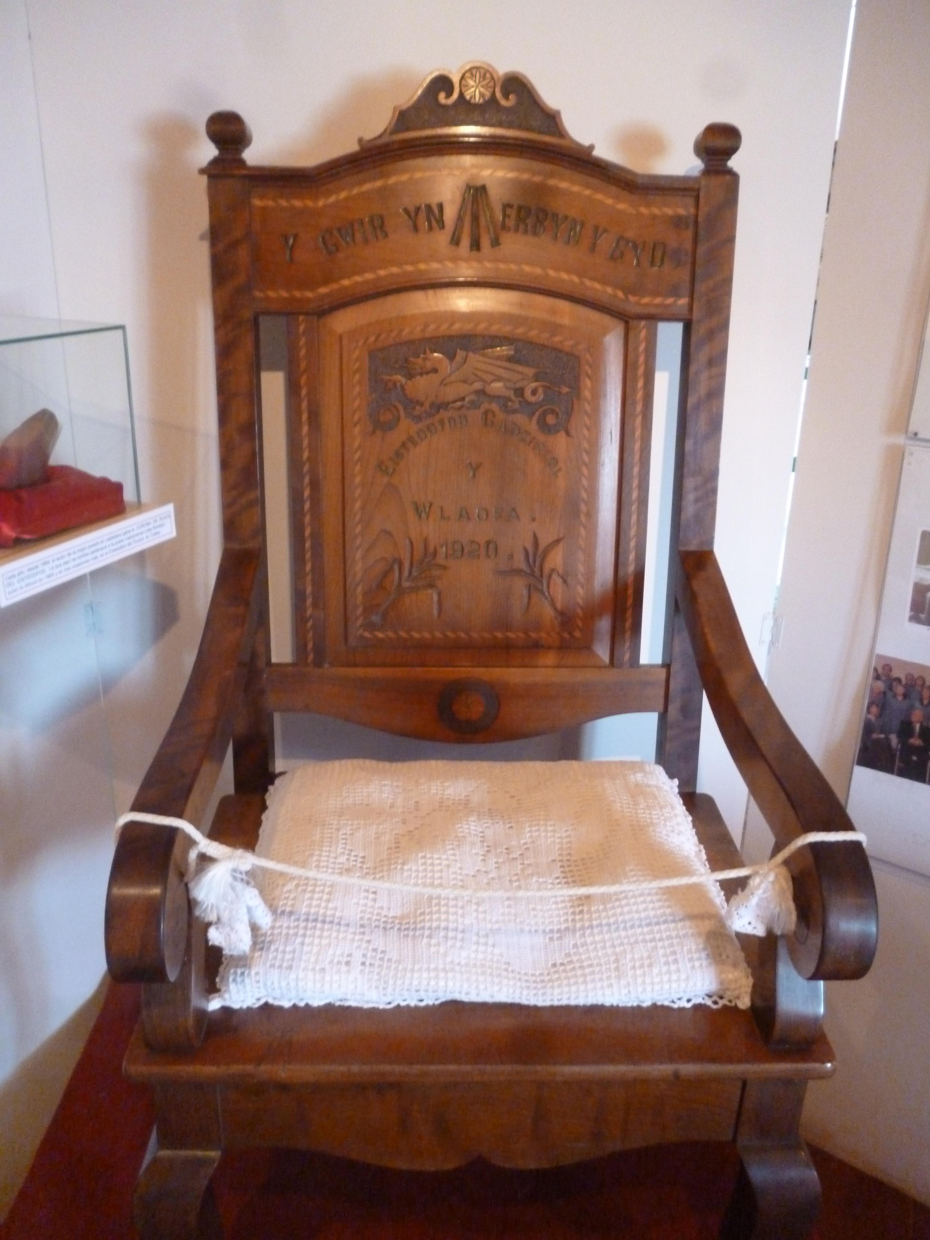 Sillón del Eisteddfod en el Museo del Desembarco de Puerto Madryn